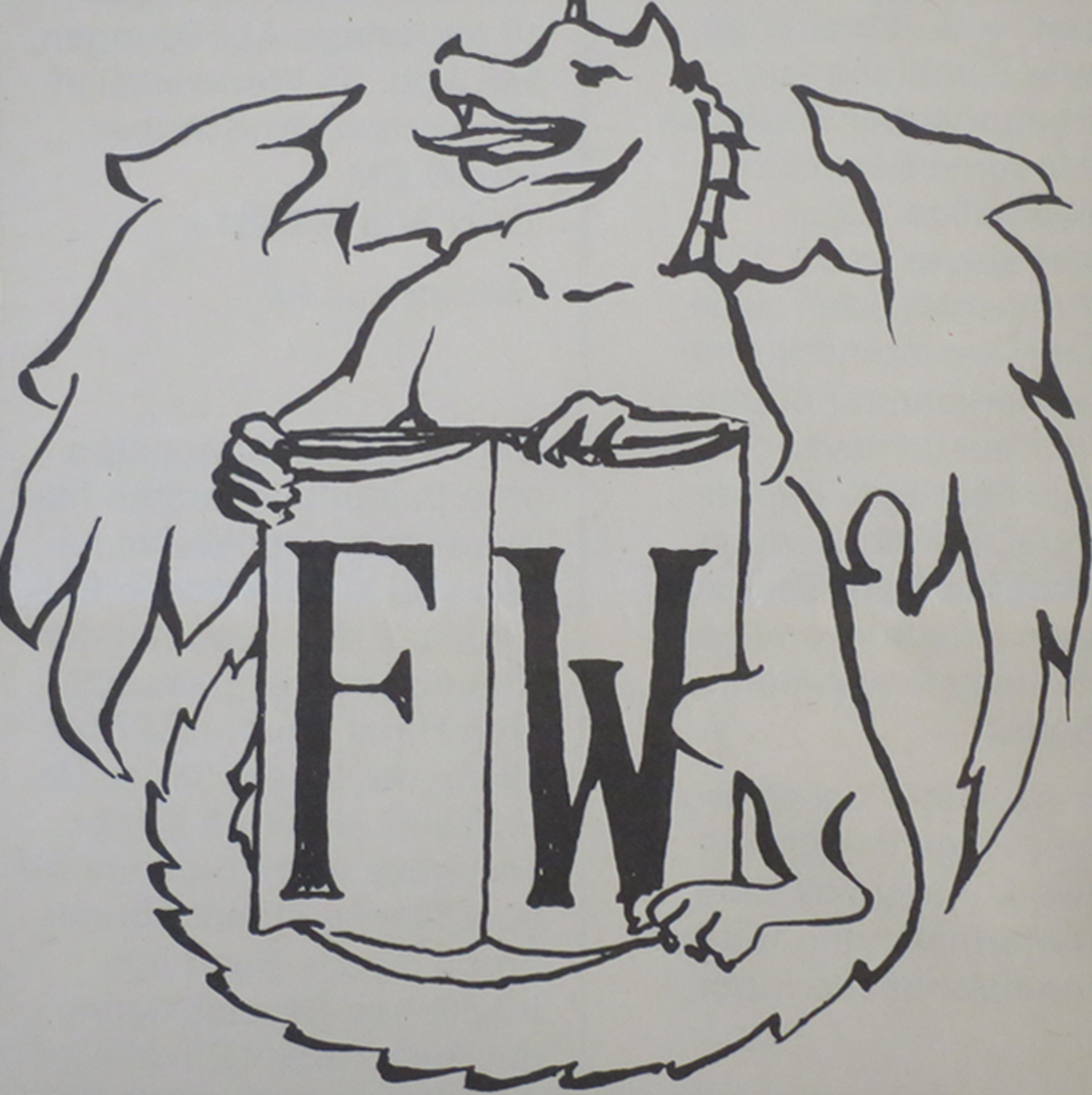 Logo der Wernerschen Verlagsgesellschaft